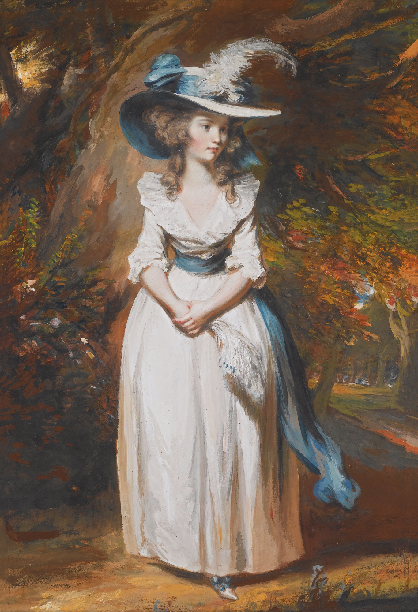 Mary Whitbread, later Lady Grey (1770-1858) pastel and gouache on paper 100.4 x 70.1 cm 1783